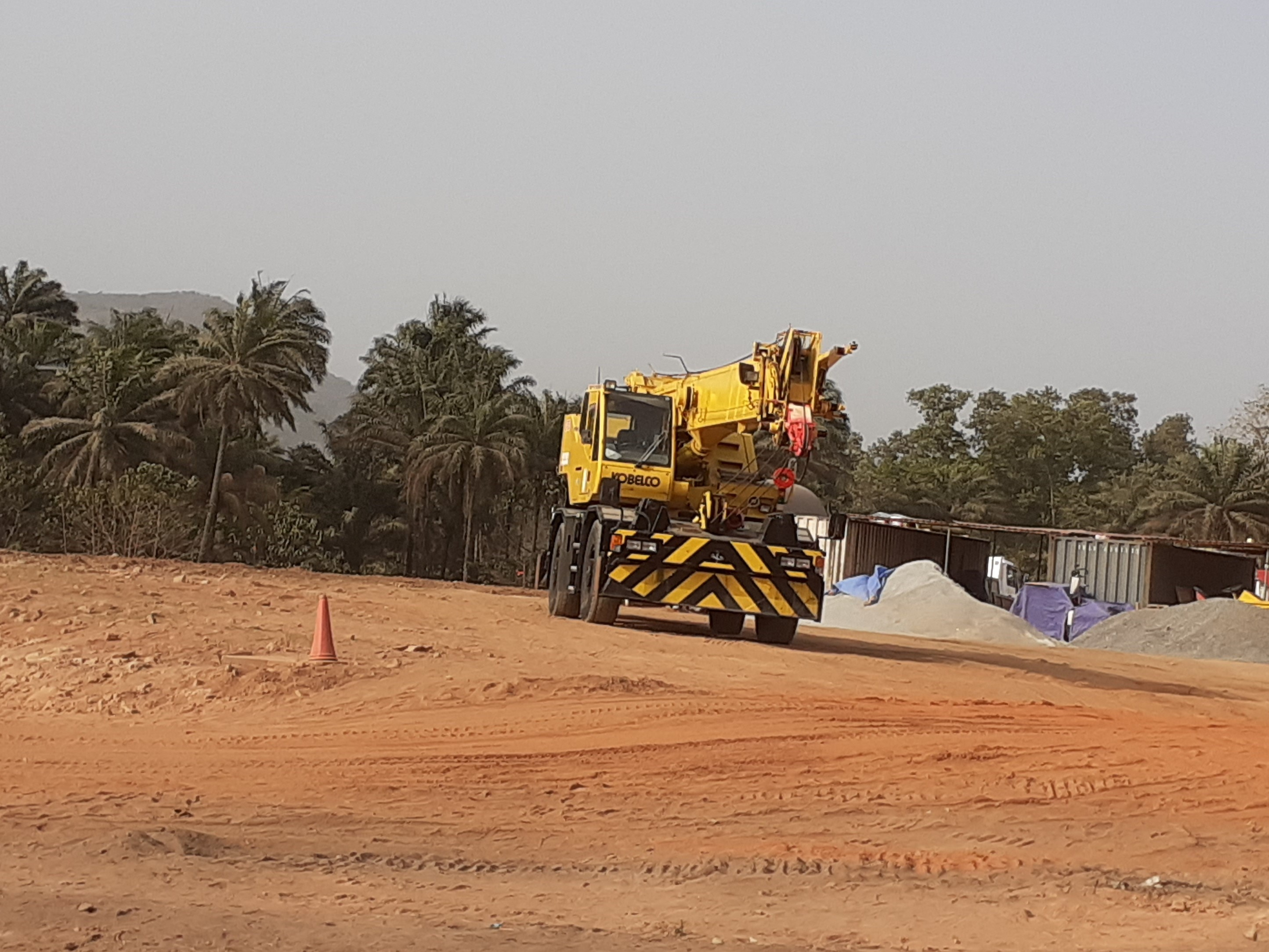 Pelle à Dubréka This is an image with the theme "Africa on the Move or Transport" from: Guinea